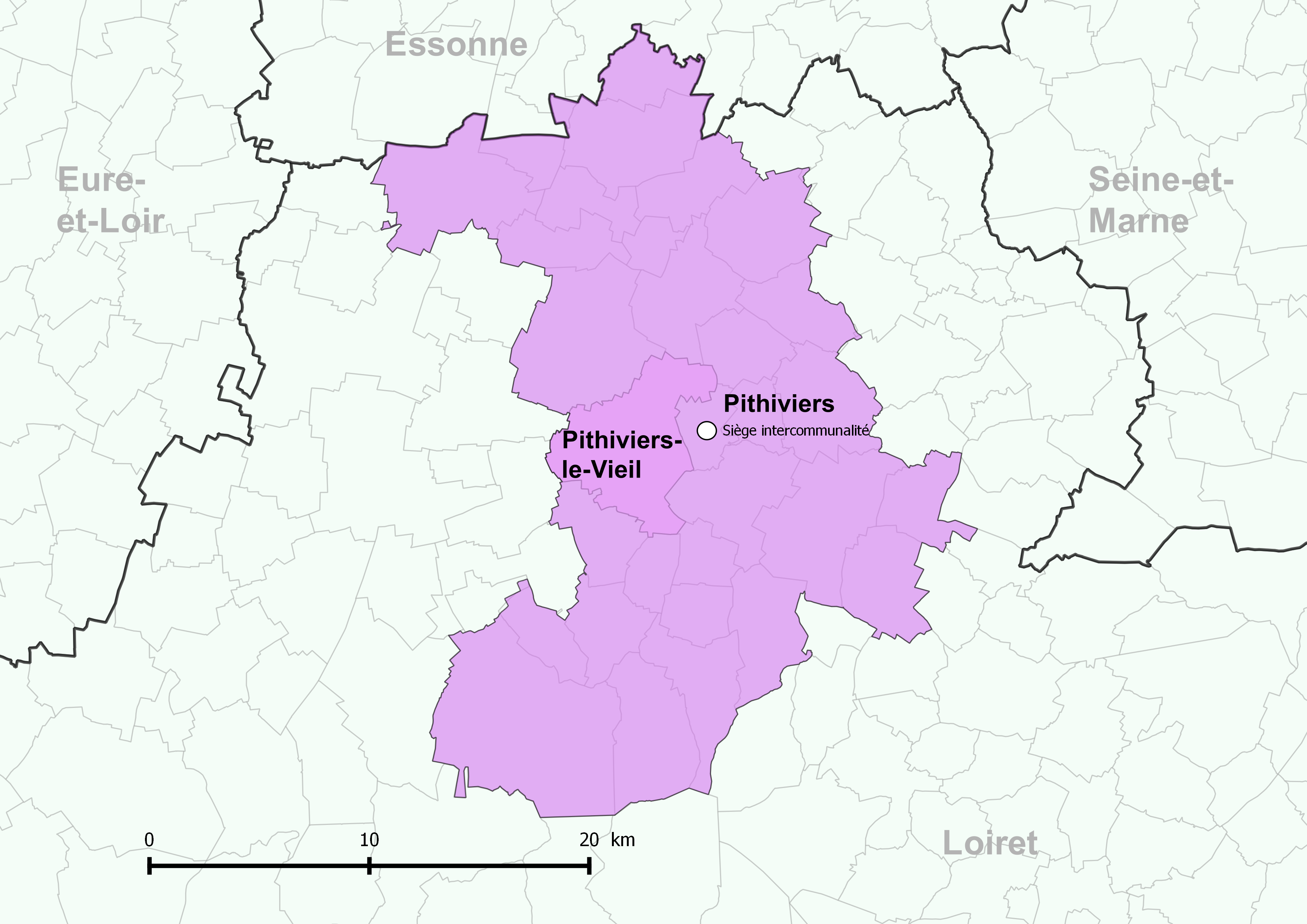 Périmètre de la communauté de communes du Pithiverais - Positionnement de la commune de Pithiviers-le-Vieil.